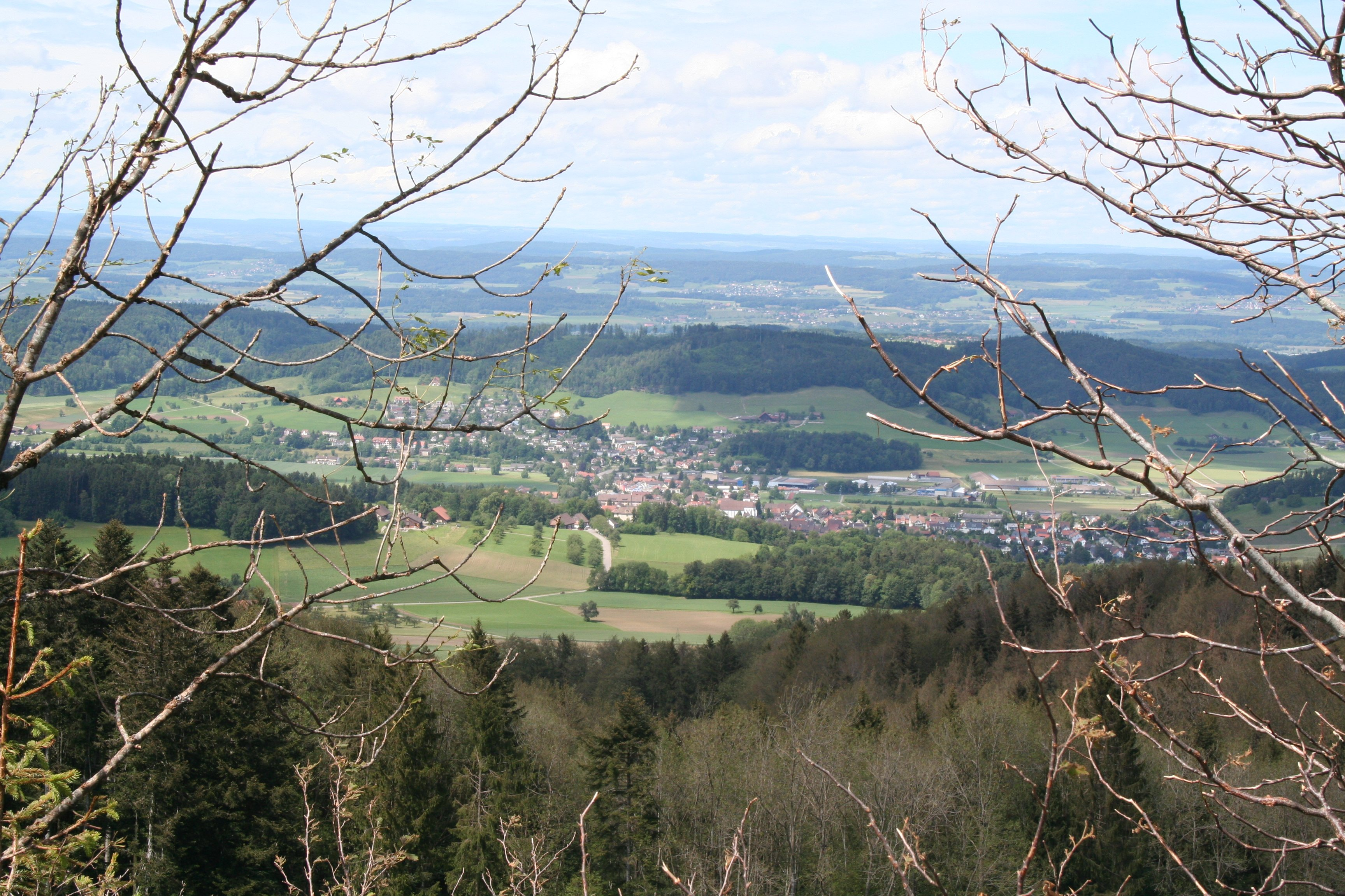 Elgg, Ansicht vom Schauenberg 890 m ü.M., Gemeinde Hofstetten ZH